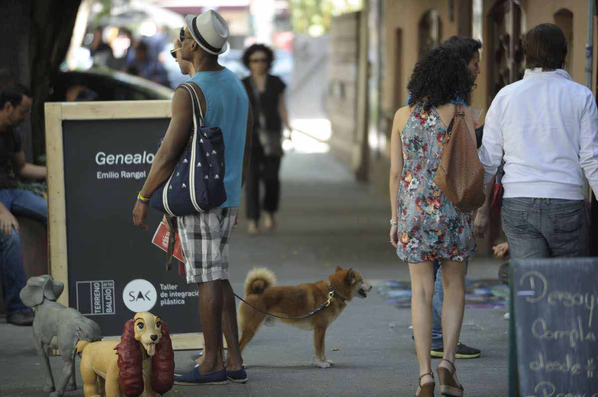 Paseantes en la colonia Roma, fuera de la Galería Terreno Baldío Arte, como parte de las actividades del Corredor Cultural Roma Condesa 2012.